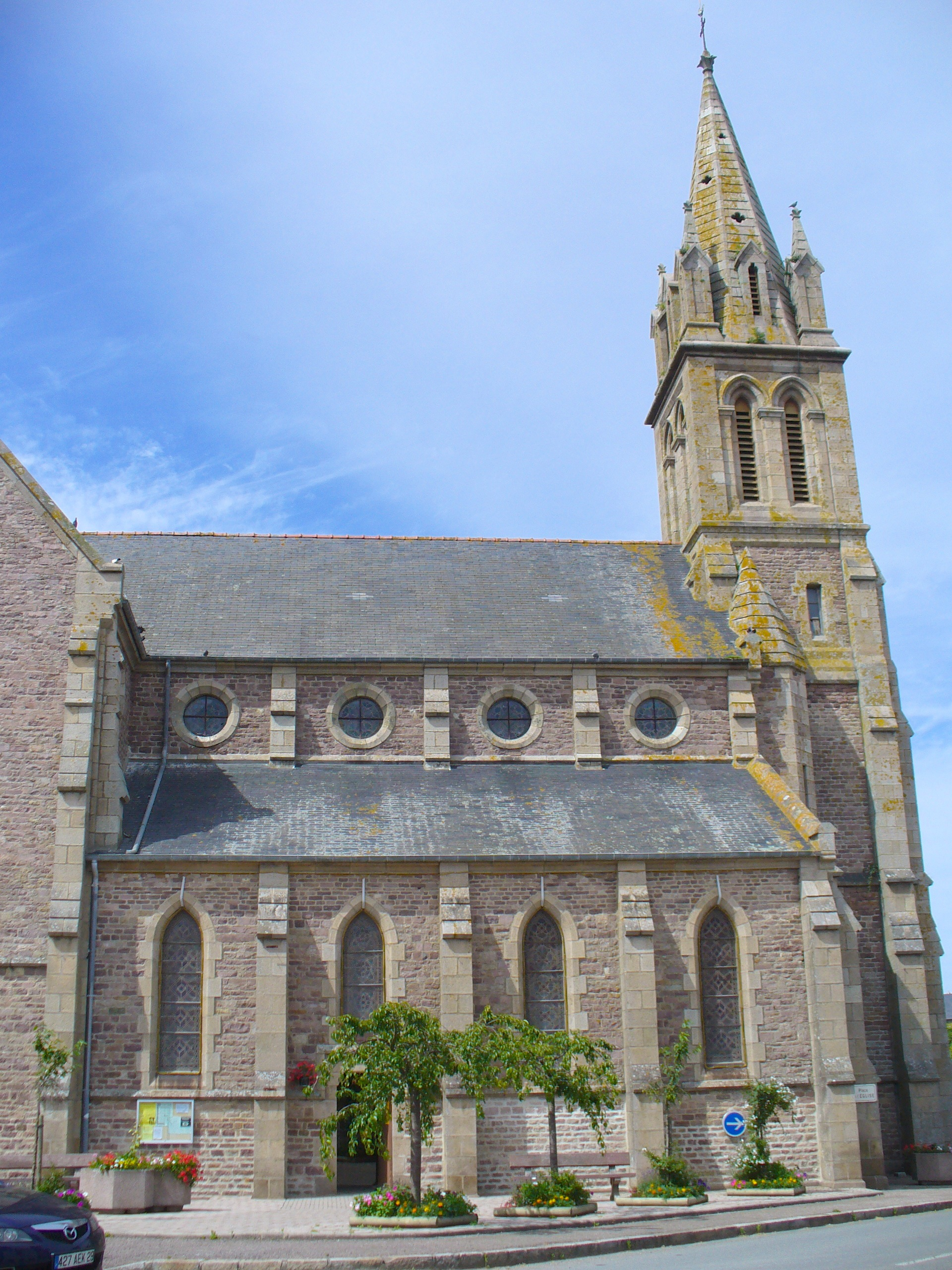 Plevenon Eglise-Departement Cotes de Armor-Bretagne-Frankreich